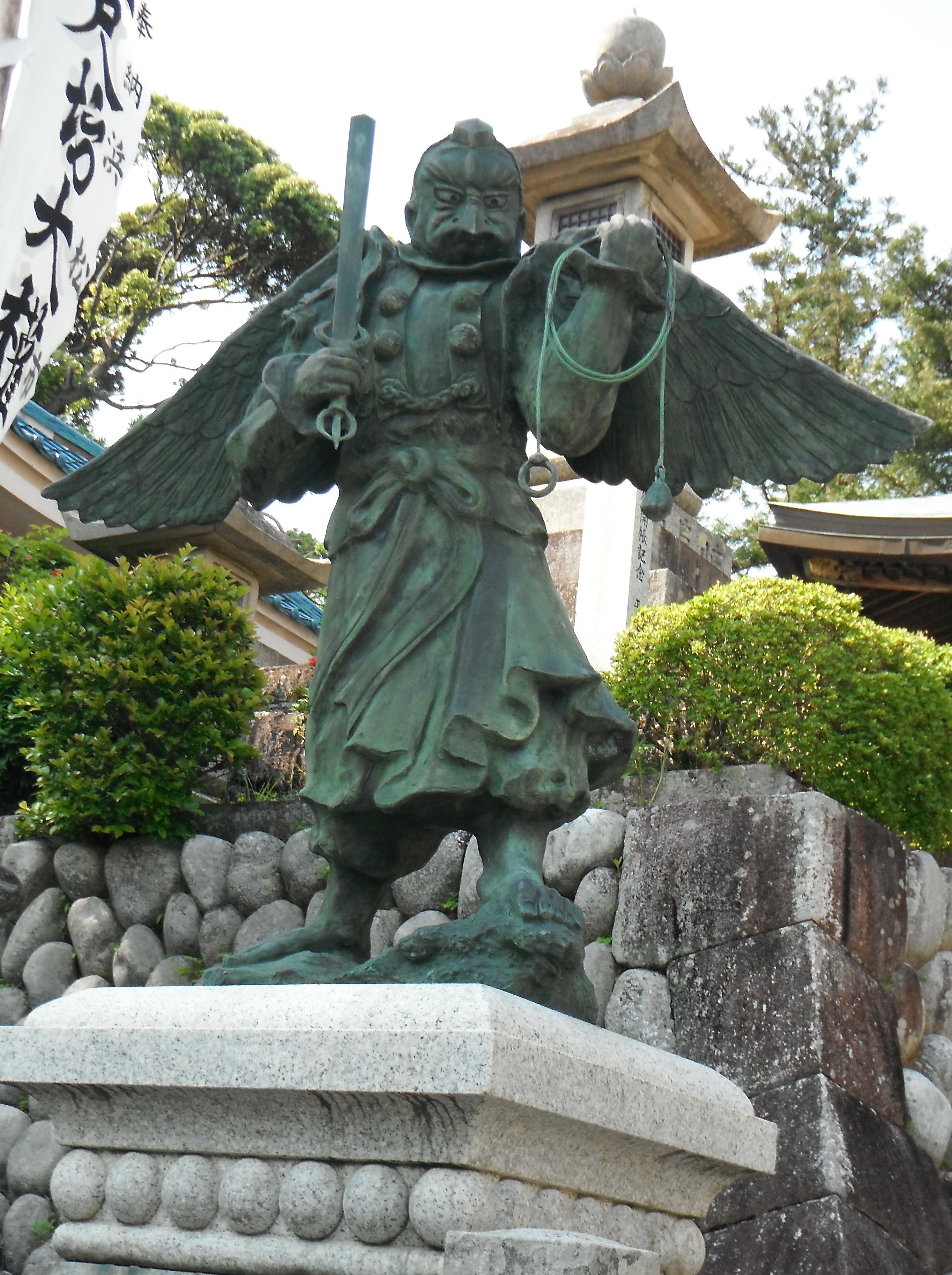 烏天狗像（静岡県袋井市・可睡斎）